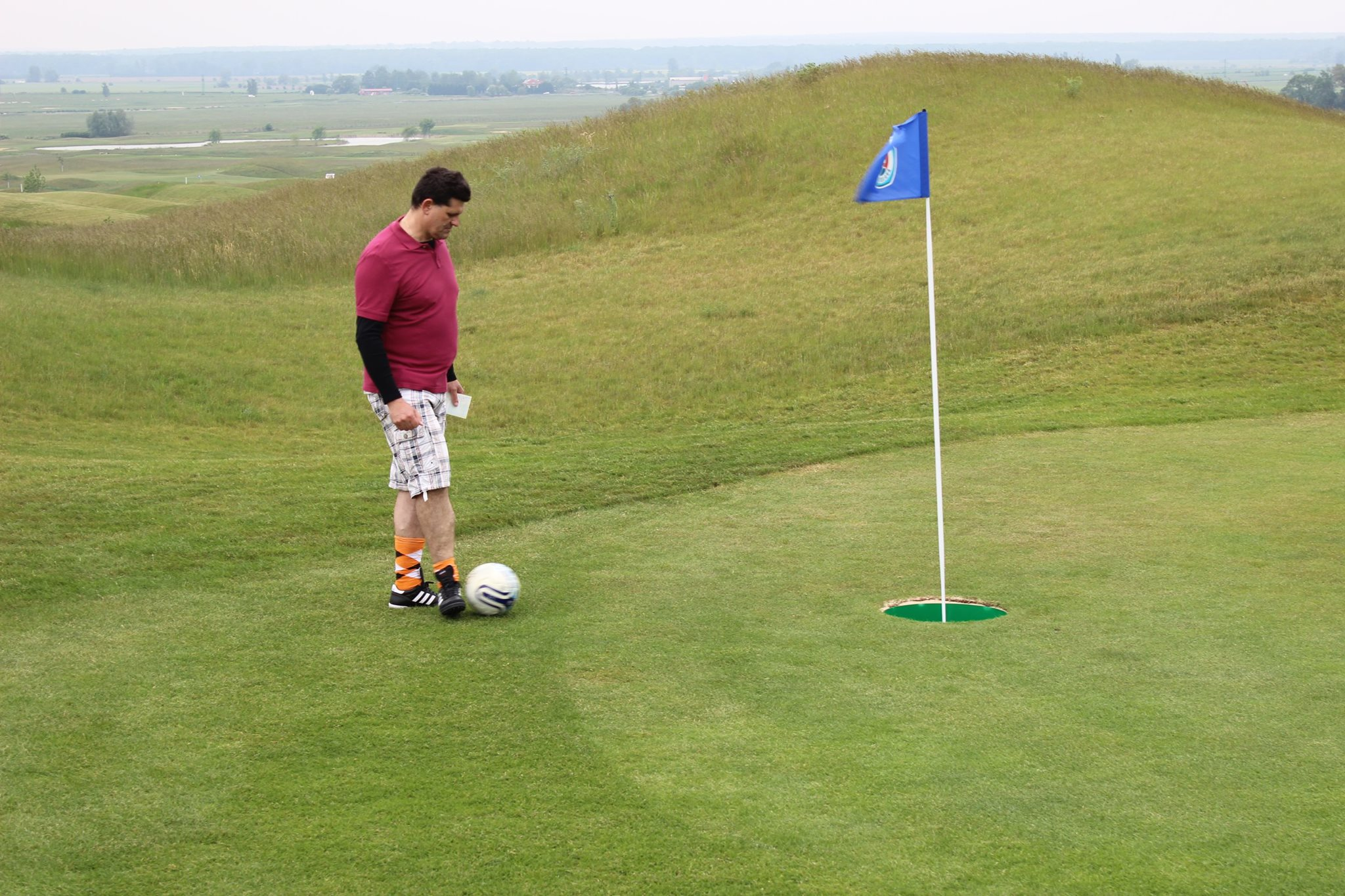 Jamkovisko na ihrisku v Skalici.